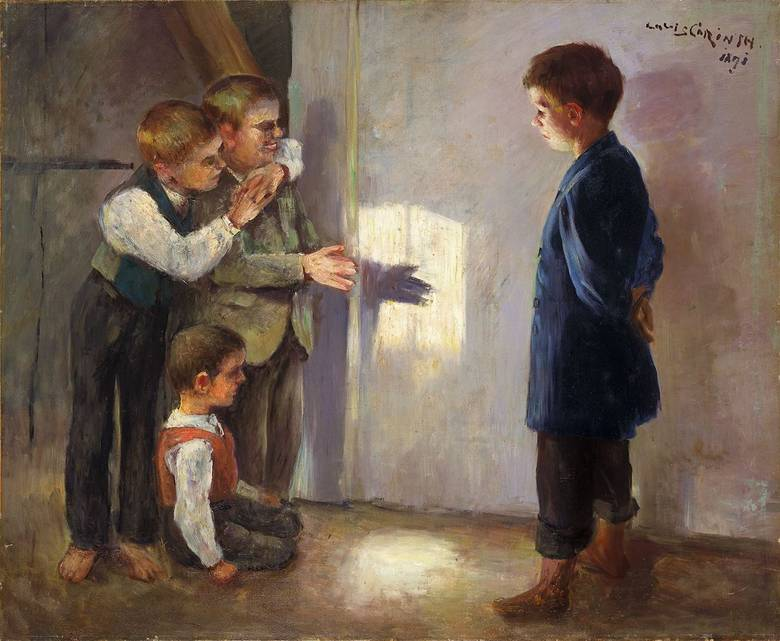 Schattenspiele